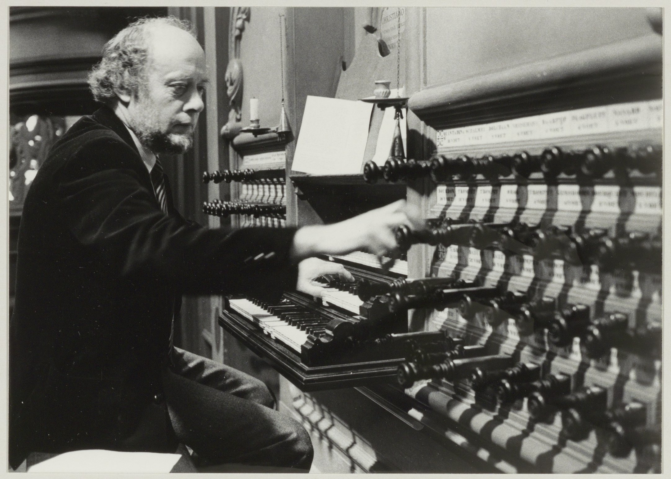 CollectieCollectie Fotoburo de BoerInventarisnummerNL-HlmNHA_54013903NL-HlmNHA_1478_23047KBeschrijvingOrganist Klaas Bolt trekt de registers open van het Müllerorgel in de Grote of St. Bavokerk.FotonummerNL-HlmNHA_1478_2691DocumenttypePortrettenVervaardigerBoer, Cees de (1918-1985) Soort vervaardigerFotograaf Interieur/ExterieurinterieurAnnotatiesHD090583PersonenBolt, Klaas LandNederland ProvincieNoord-Holland GemeenteHaarlem PlaatsHaarlem StraatGrote Markt GeografischCentrum Begindatum05-1983Einddatum05-1983TechniekFoto Trefwoordenkerkorgels, Kerken